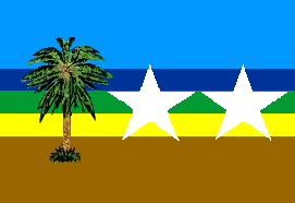 Bandera del municipio Antonio Díaz, isla de Margarita, estado Nueva Esparta, Venezuela